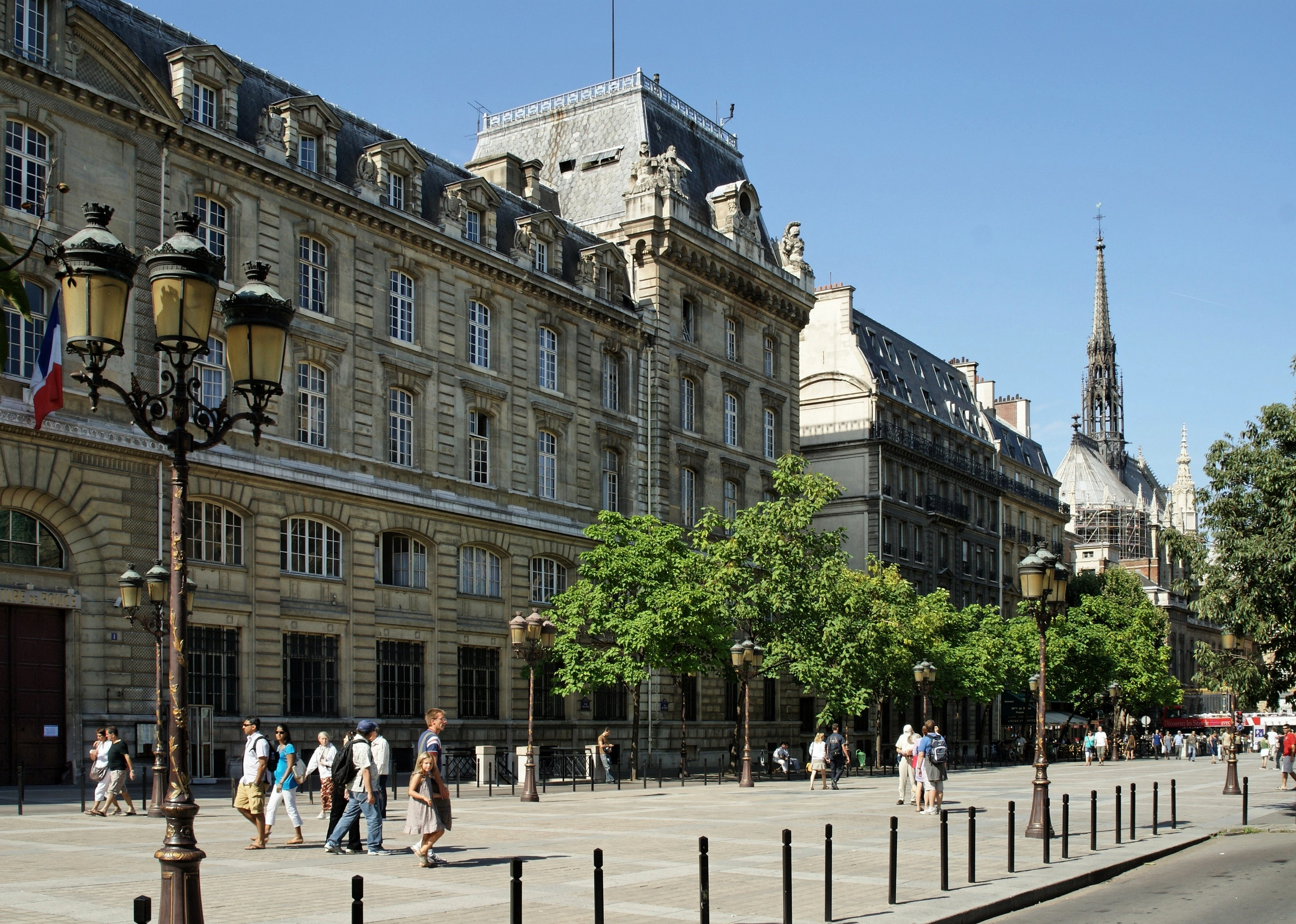 Promenade devant le Palais de Justice à Paris